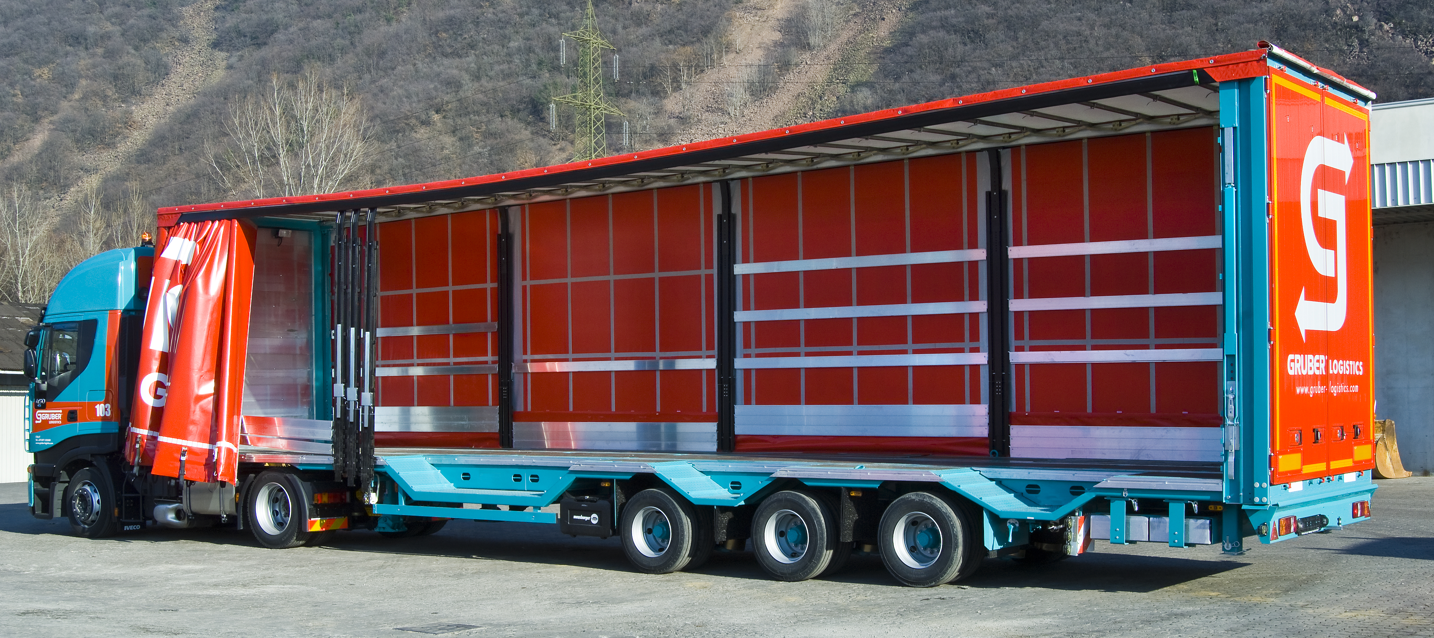 Megatrailer mit offener Varioplane, weggeschobenen Stehern und seitlichen Mulden etwa zum Verstauen von Zurrgurten